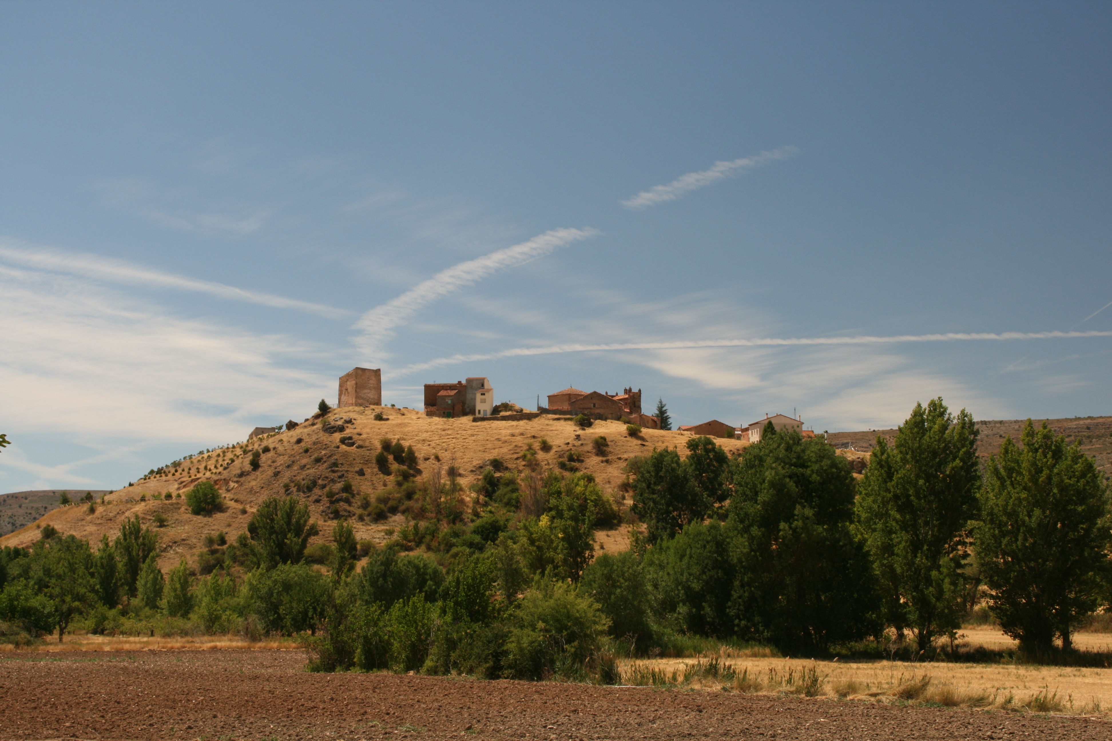 Riba de Saelices, Guadalajara, España